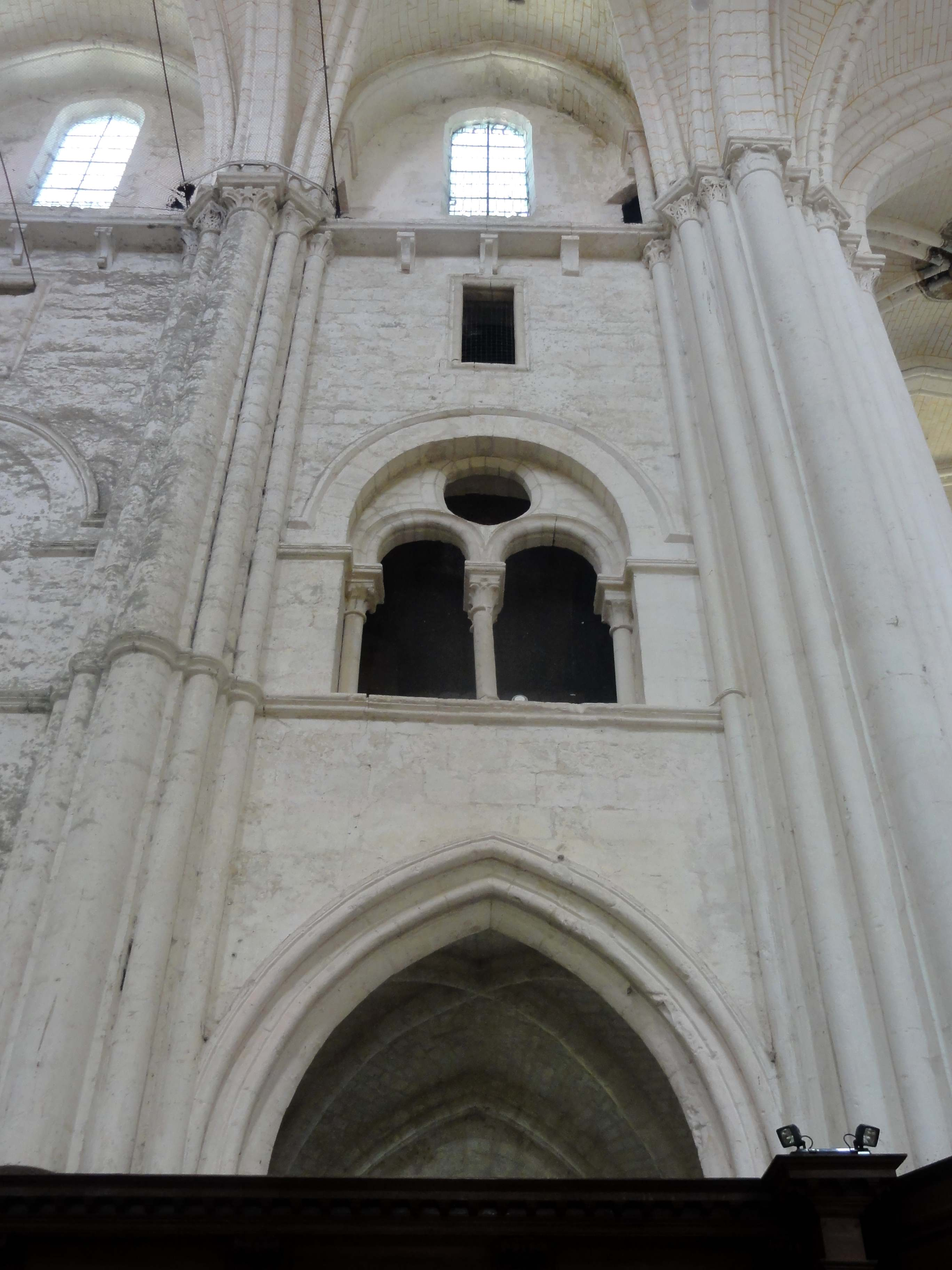 Nef de l'abbatiale - voir le titre du fichier.